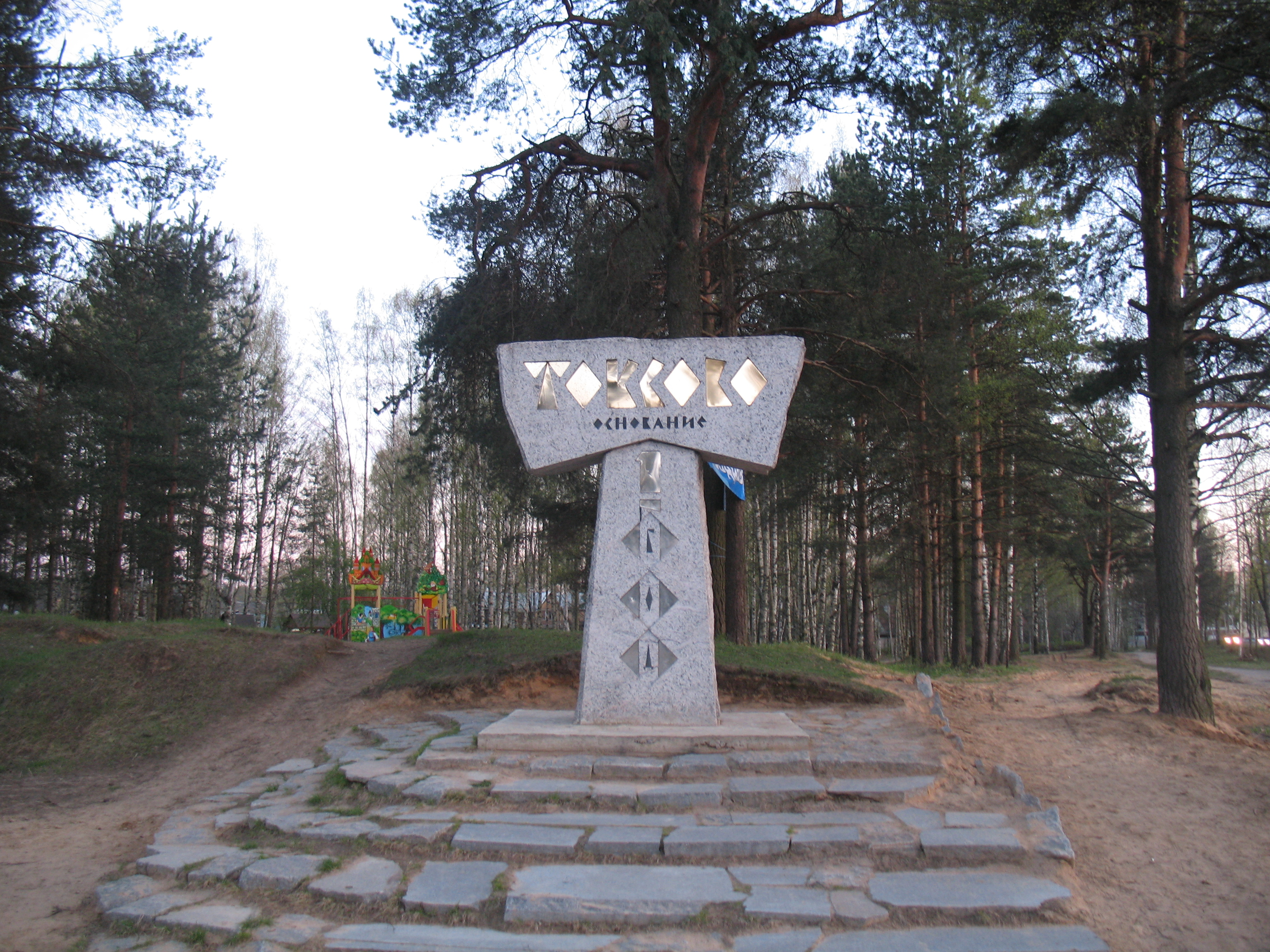 Toksovo, Leningrad Oblast, Russia.